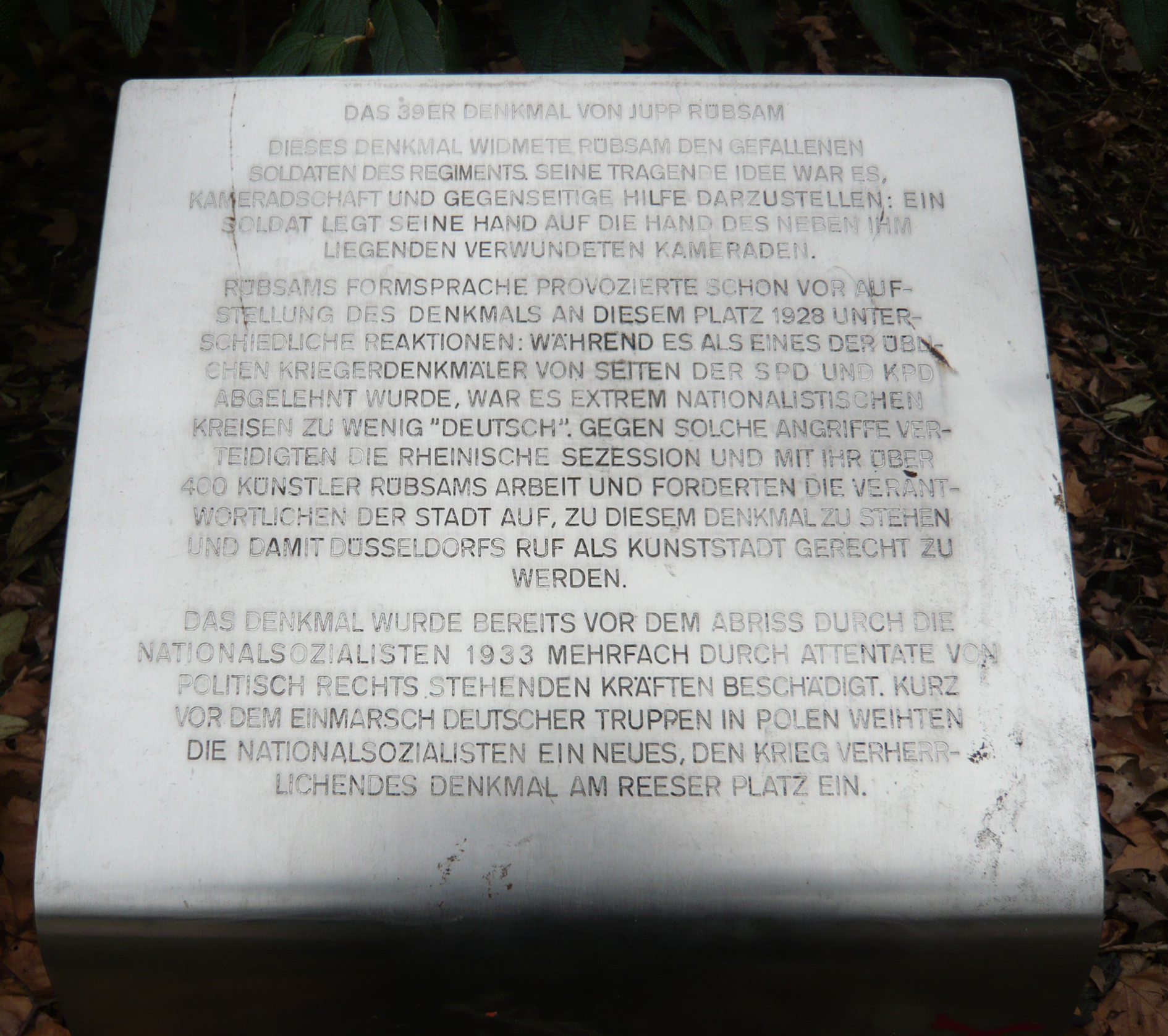 Gedenktafel Düsseldorf an der Tonhalle zu Skulptur von Jupp Rübsam 39erText: Das 39er Denkmal von Jupp Rübsam. Dieses Denkmal widmete Rübsam den Gefallenen des Regiments. Seine tragende Idee war es, Kameradschaft und Gegenseitige Hilfe darzustellen: ein Soldat legt seine Hand auf die Hand des neben ihm liegenden Verwundeten Kameraden. Rübsams Formensprache provozierte schon vor Aufstellung des Denkmals 1928 unterschiedliche Reaktionen: während es als eines der üblichen Kriegsdenkmäler von Seiten der SPD und KPD abgelehnt wurde, war es extrem nationalistischen Kreisen zu wenig "Deutsch". Gegen solche Angriffe verteidigte die "Rheinische Sezession" und mit ihr über 400 Künstler Rübsams Arbeit und forderten die Verantwortlichen der Stadt auf, zu diesem Denkmal zu stehen und damit den Düsseldorfs Ruf als Kunststadt gerecht zu werden. Das Denkmal wurde bereits vor dem Abriss durch die Nationalsozialisten 1933 mehrfach durch Attentate von politisch rechts stehenden Kräften beschädigt. Kurz vor dem Einmarsch deutscher Truppen in Polen weihten die Nationalsozialisten ein neues, den Krieg verherrlichendes Denkmal am Reeder Platz ein.